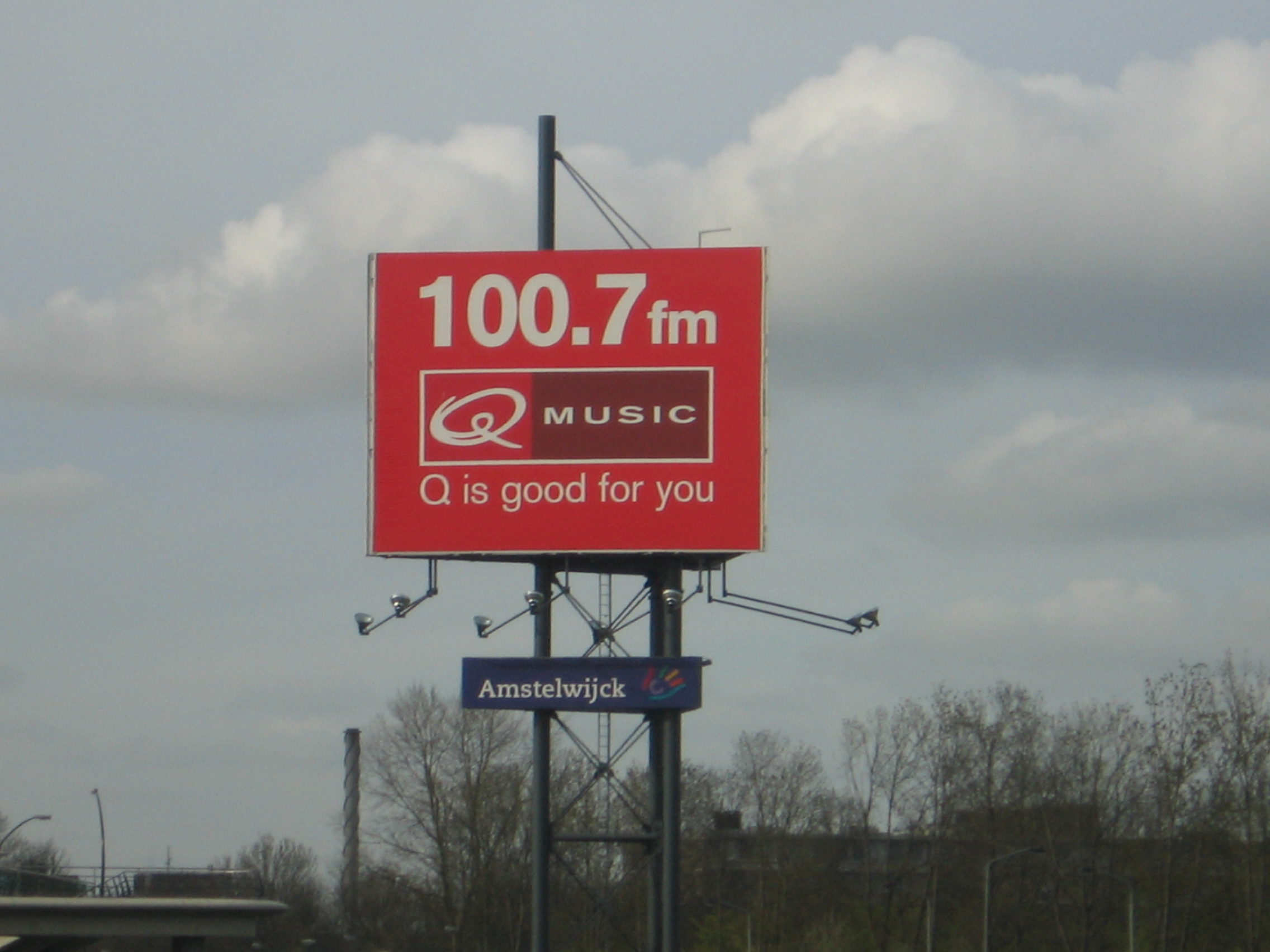 Q-music billboard, april 2006